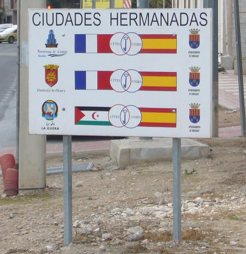 Cartel, en la entrada de Crevillente (N-340, desde Elche), que muestra las ciudades con las que está hermanada: Fontenay-le-Comte (Francia) Fontenay-le-Fleury (Francia) La Güera (Sáhara Occidental)